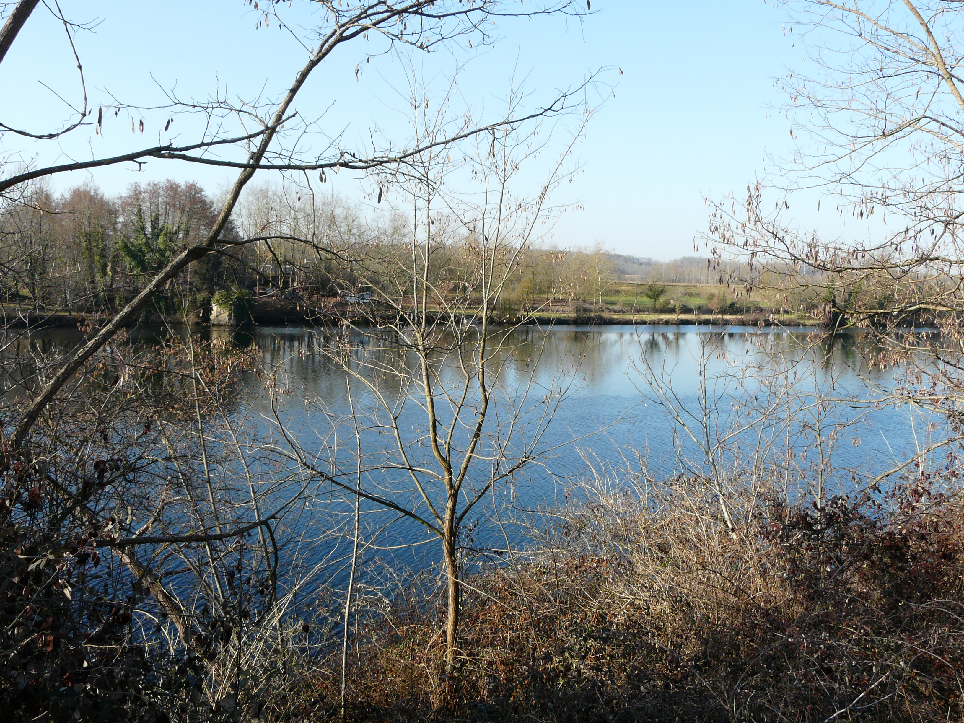 La Dordogne à Baneuil, Dordogne, France. Sur la rive en face, le Port-de-Lanquais, commune de Varennes.